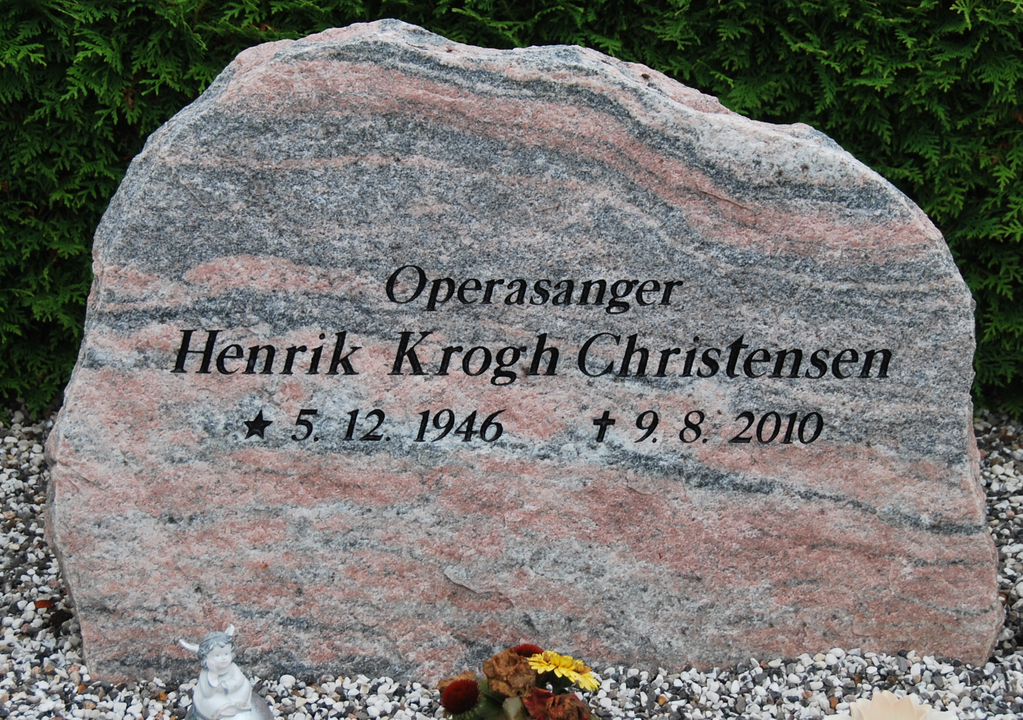 Gravsten for operasanger Henrik Krogh Christensen (1946-2010). Placeret på Viborg Kirkegård.